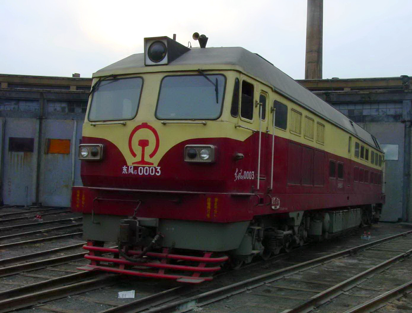 中文（中国大陆）: 东风6型柴油机车（车型代号DF6），设计阶段原称东风4D型，由大连机车车辆厂以东风4型系列机车为基础，通过引进外国企业技术和设备研制而成的大功率干线货运用内燃机车。